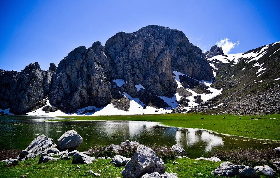 Le lac Agoulmime de Tikjda de la wilaya de Tizi Ouzou en Algérie, situé à 1700m d'altitude.